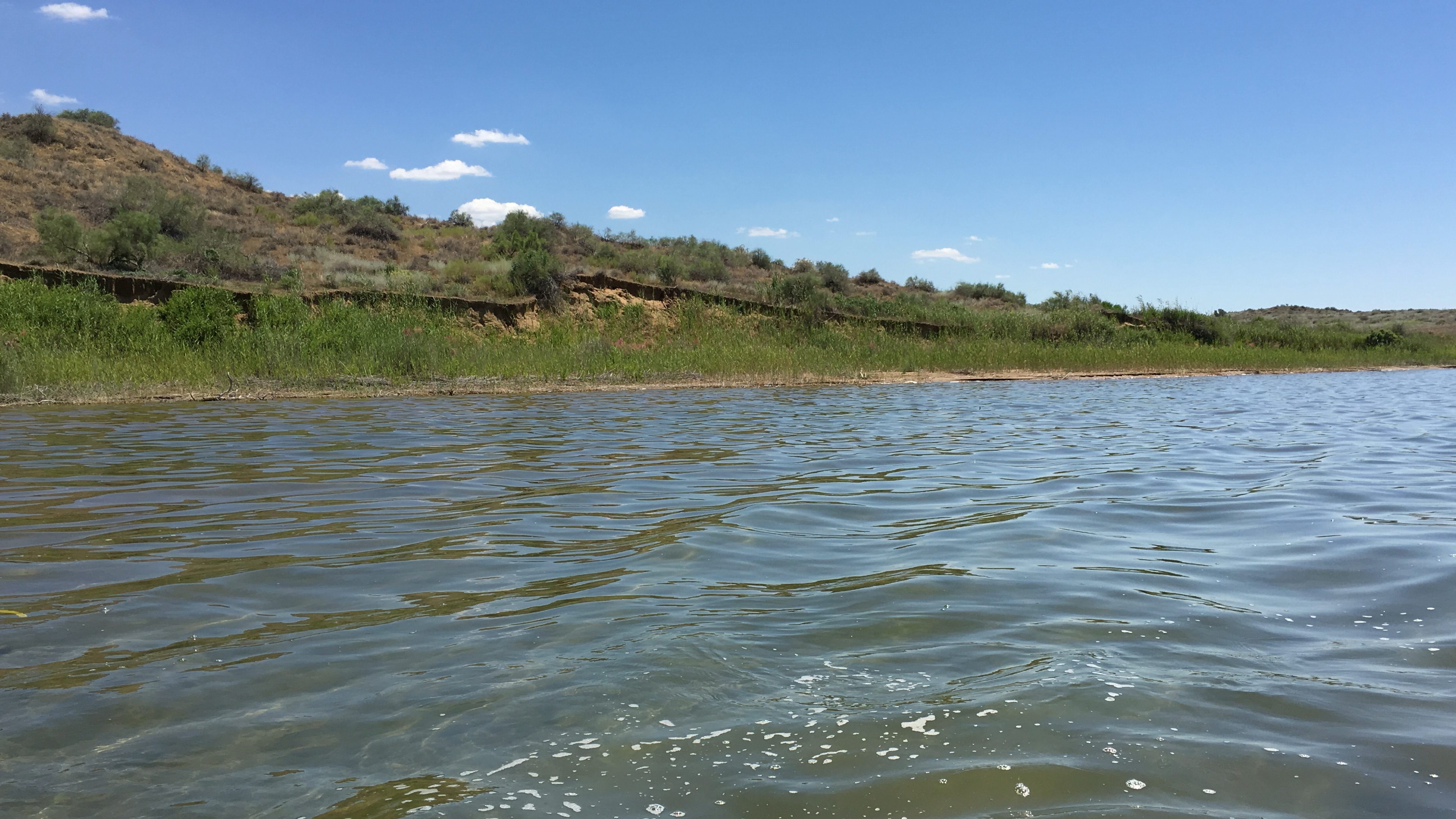 Остров Тошбака с озера Айдаркуль